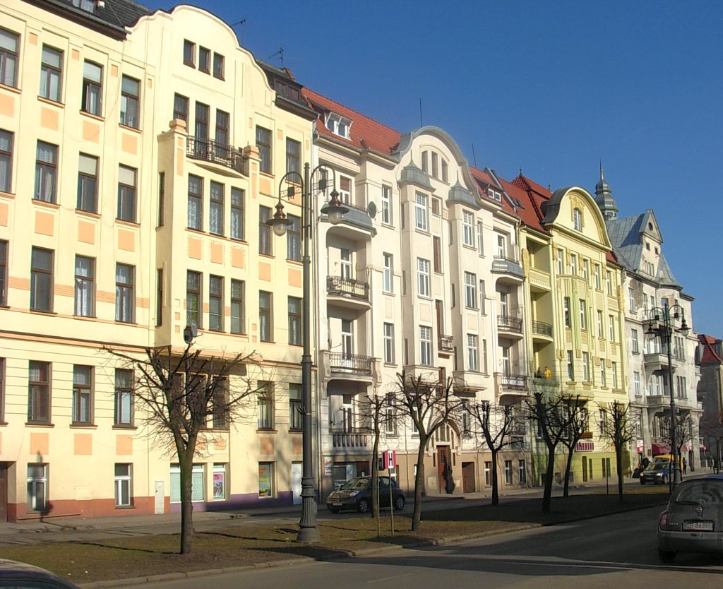 Aleja Adama Mickiewicza w Bydgoszczy